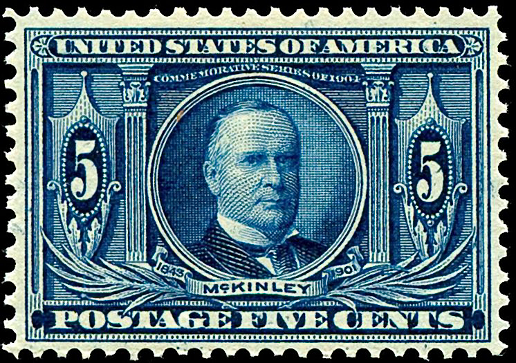 US postage stamp, 1904 issue, 5c